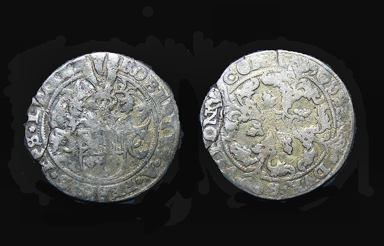 Monnaie liégeoise d'argent de Robert de Berghes. Catalogue Chestret 506